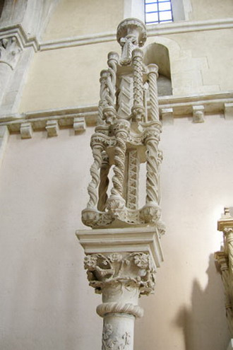 Foto Scattata da Alan_p.